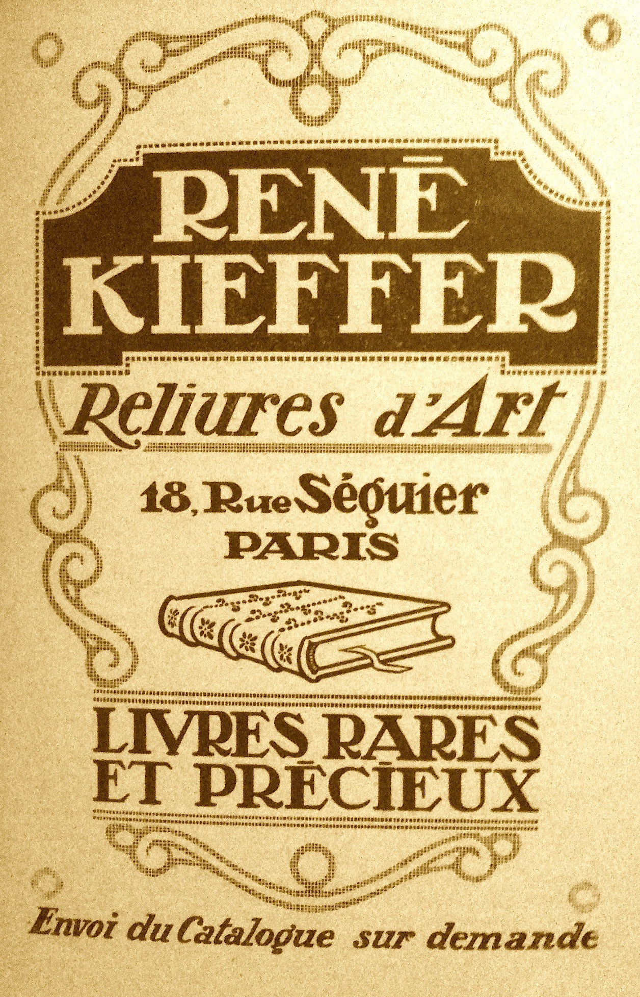 Advertisement on René Kieffer relieures d'art, boutique in Paris.